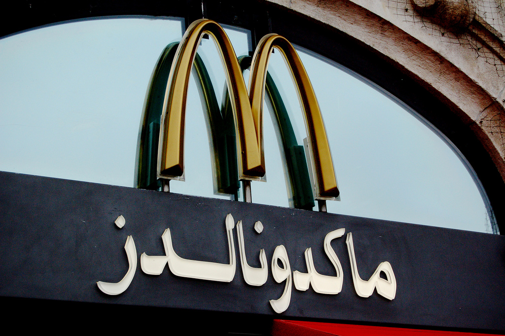 Munich.